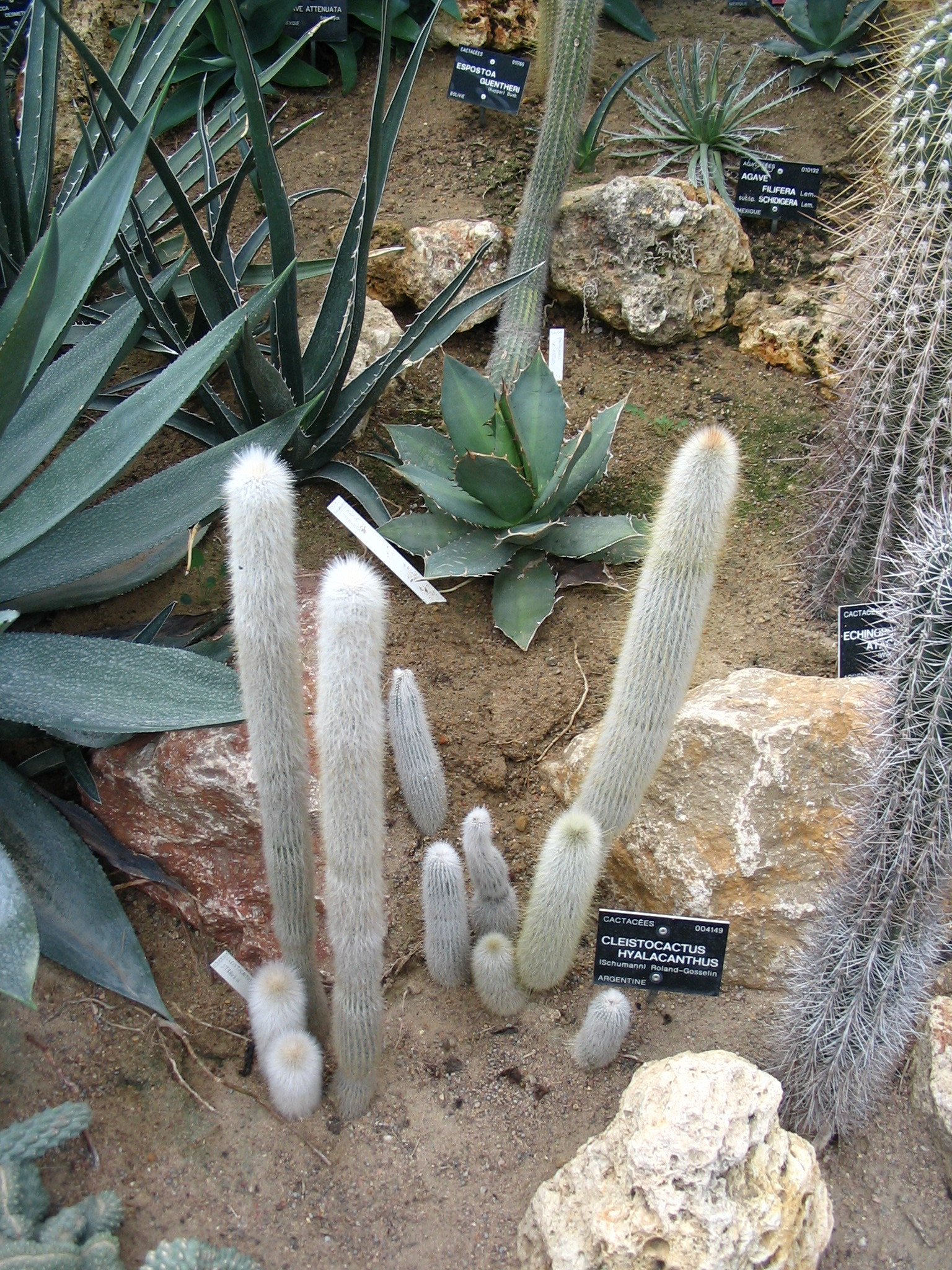 cactus